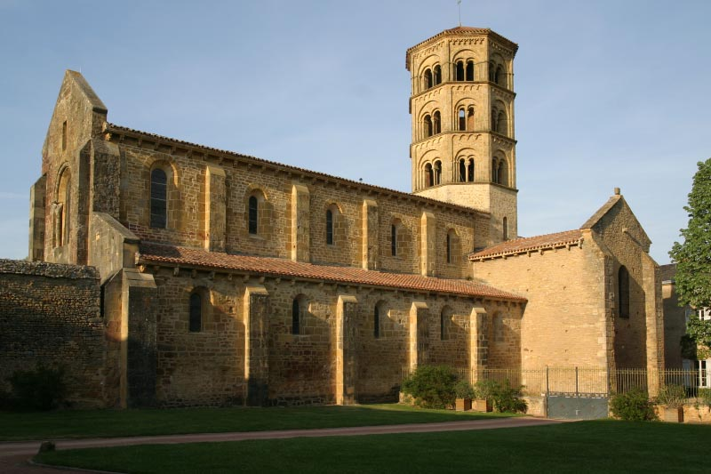 Vue générale de l'église d'Anzy-le-Duc prise du sud